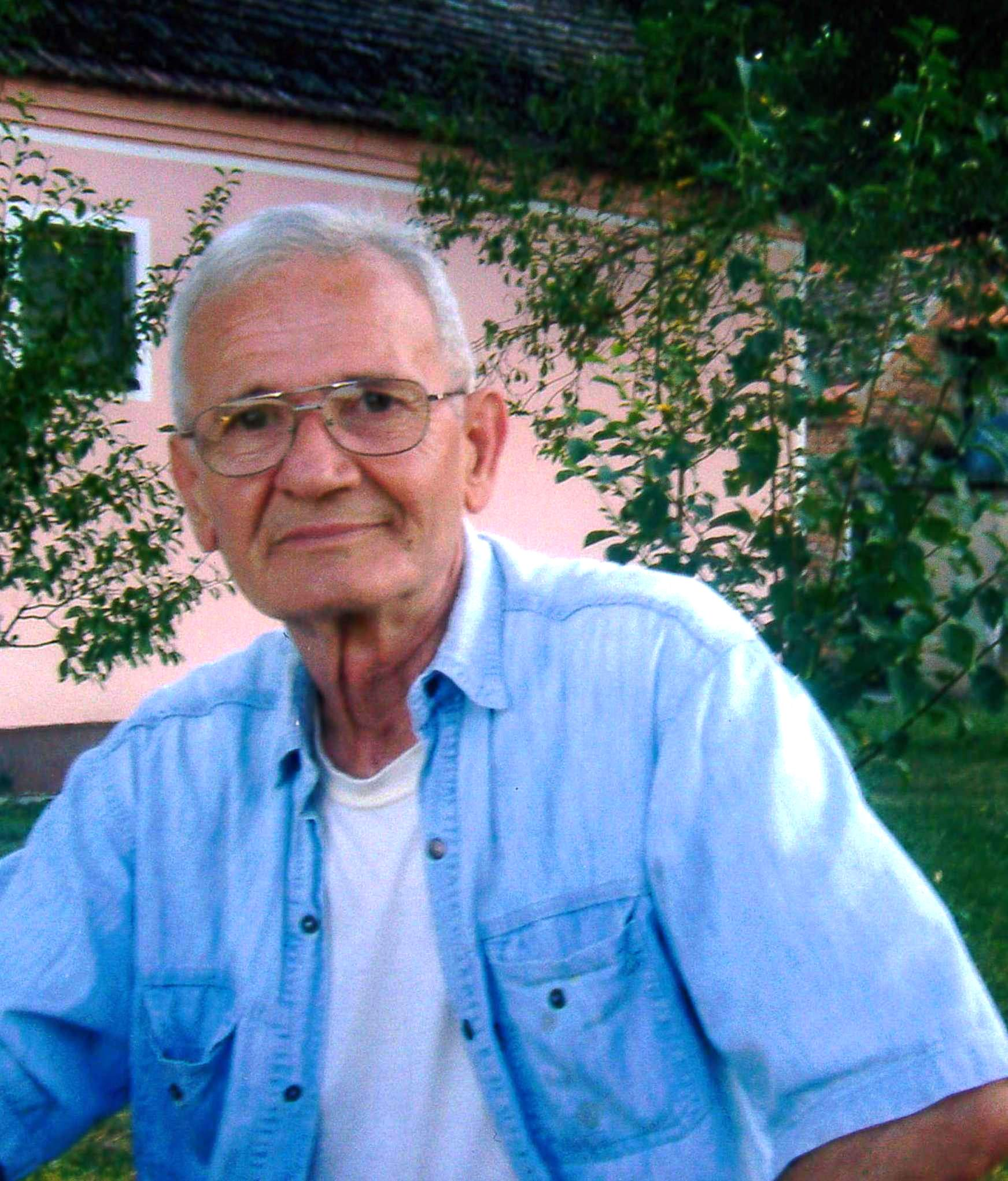 Ljubomir Kasagic